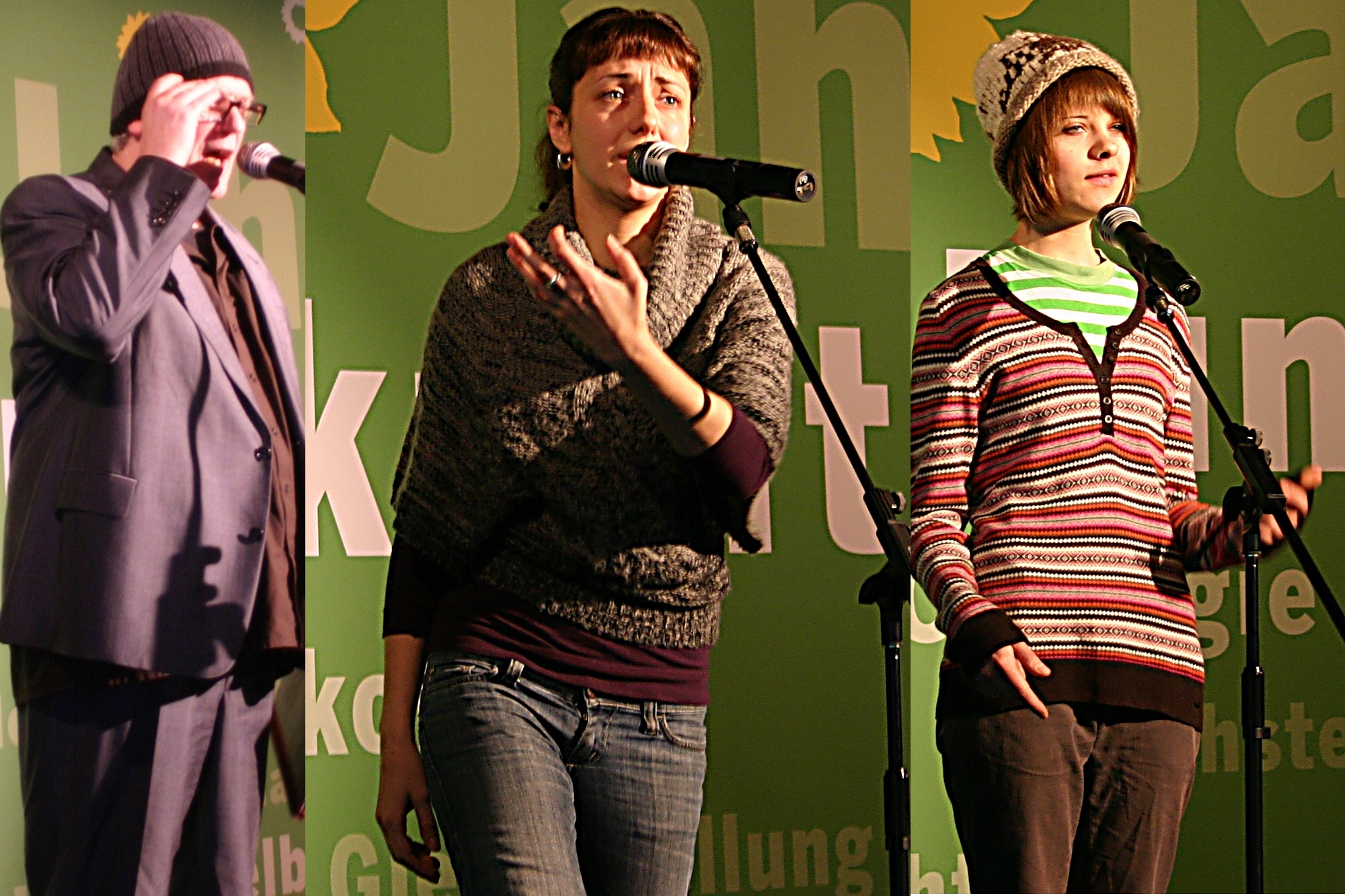 Am Sonntag, 10. Januar 2009 fand in der Beletage der Heinrich-Böll-Stiftung die Feier zum 30. Geburtstag von Bründnis 90/Die Grünen statt.